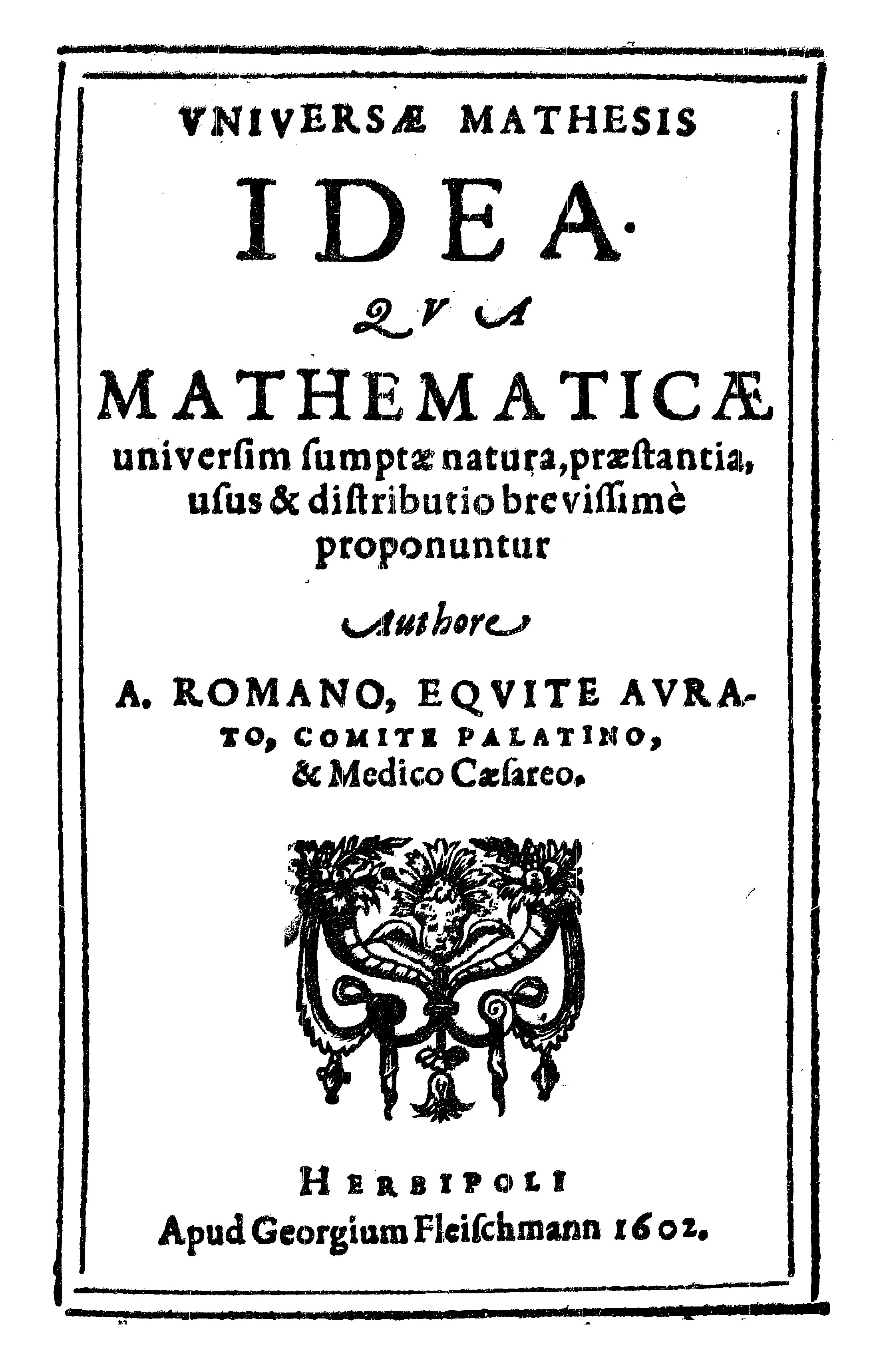 Universae mathesis idea. qua mathematicae universim sumptae natura, praestantia, usus & distributio brevissimè proponuntur Authore A. Romano, .... - Herbipoli : apud Georgium Fleischmann, 1602. - 110, [2] p. ; 8°. - VD17 1:685658U .